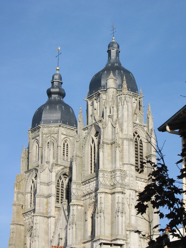 Clochers à bulbes de la basilique de Saint-Nicolas-de-Port en Lorraine.